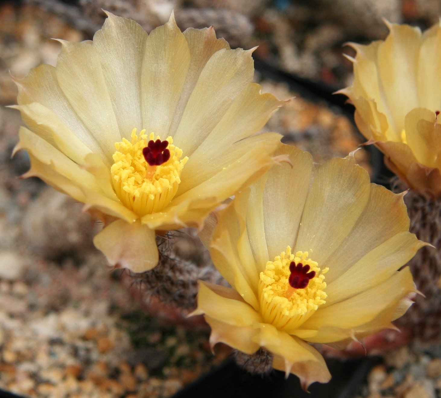 Pterocactus kuntzei in Blüte